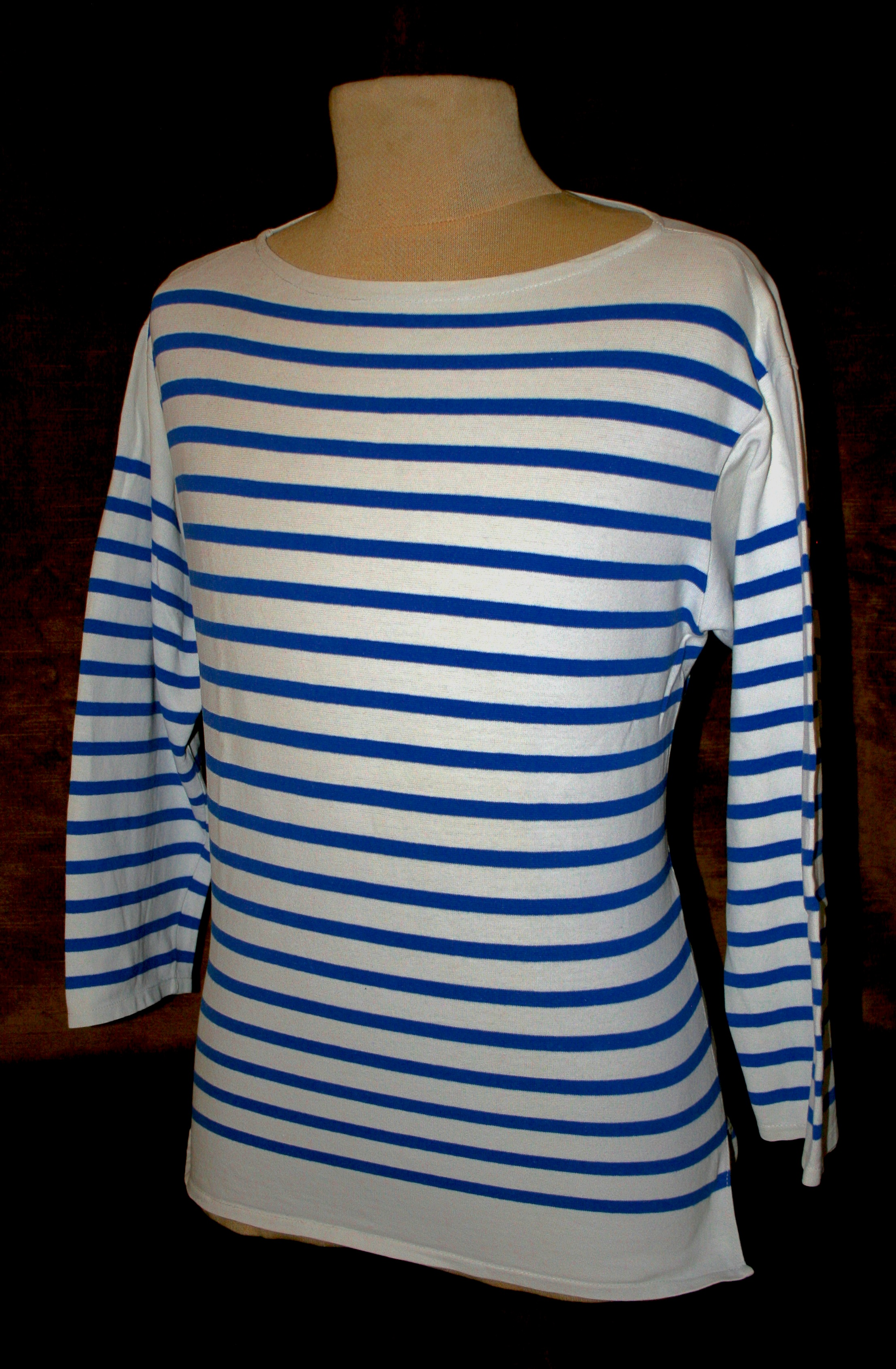 Marinière de la Marine nationale française